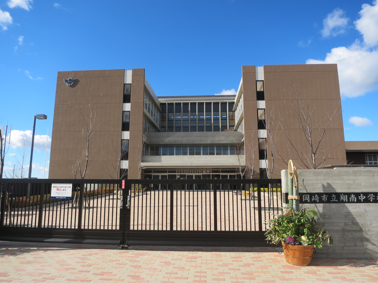 岡崎市立翔南中学校（岡崎市針崎町）